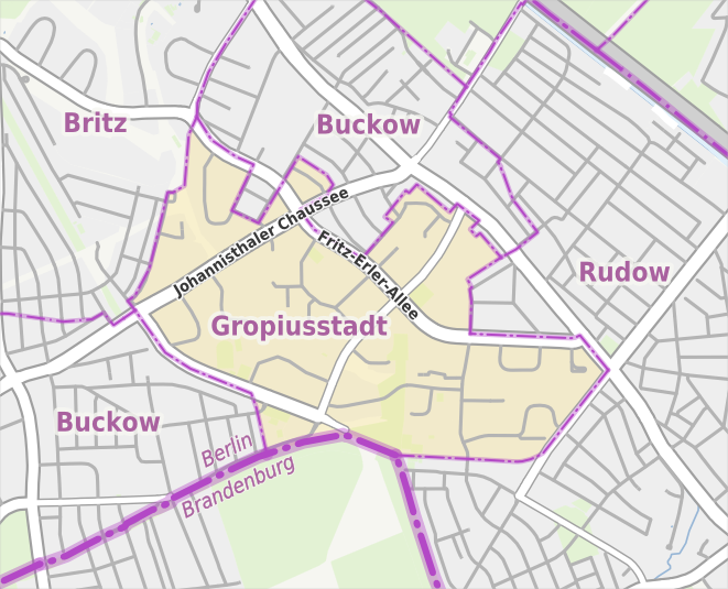 Übersichtskarte der Straßen und Ortslagen in Berlin-Gropiusstadt